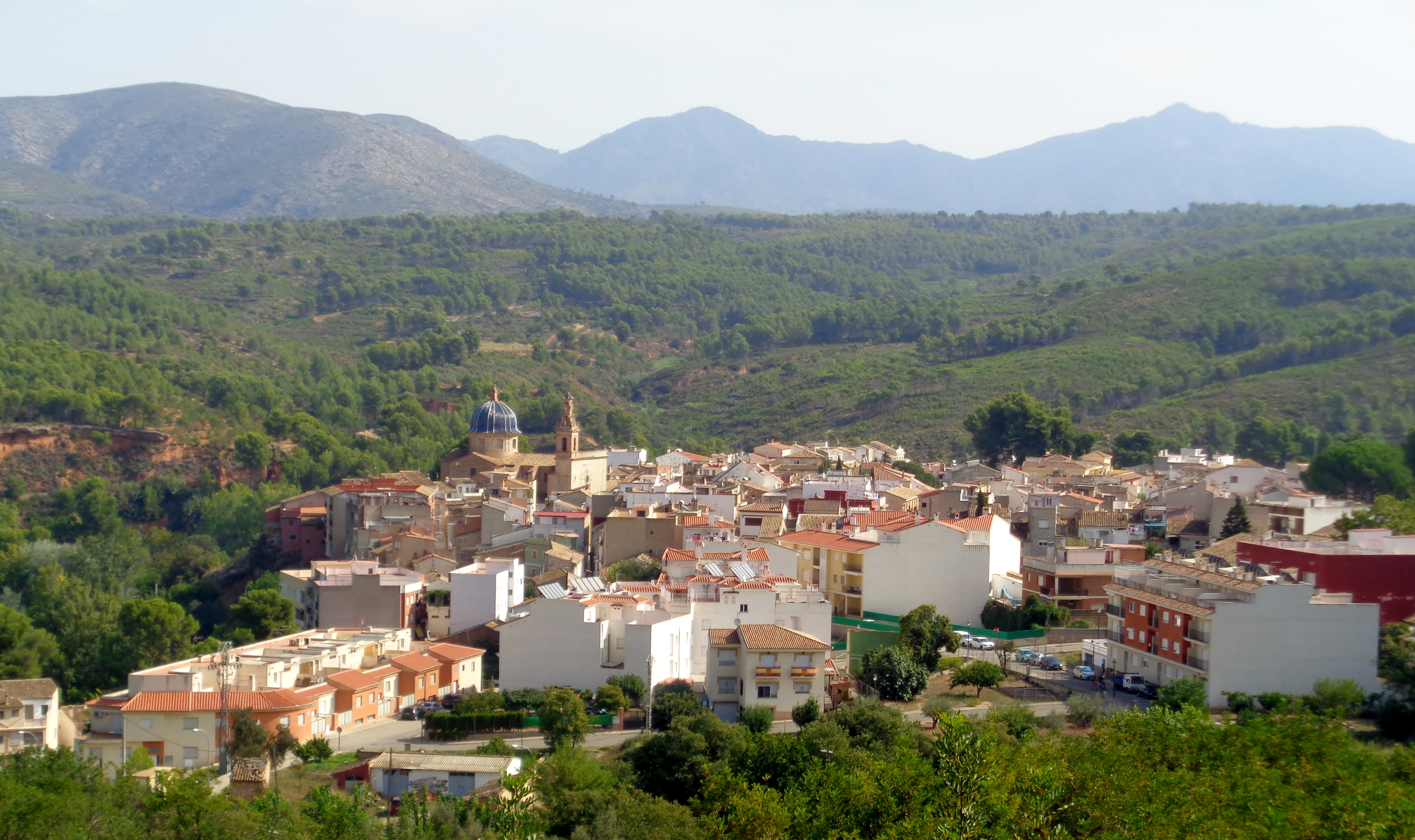 Navaixes.